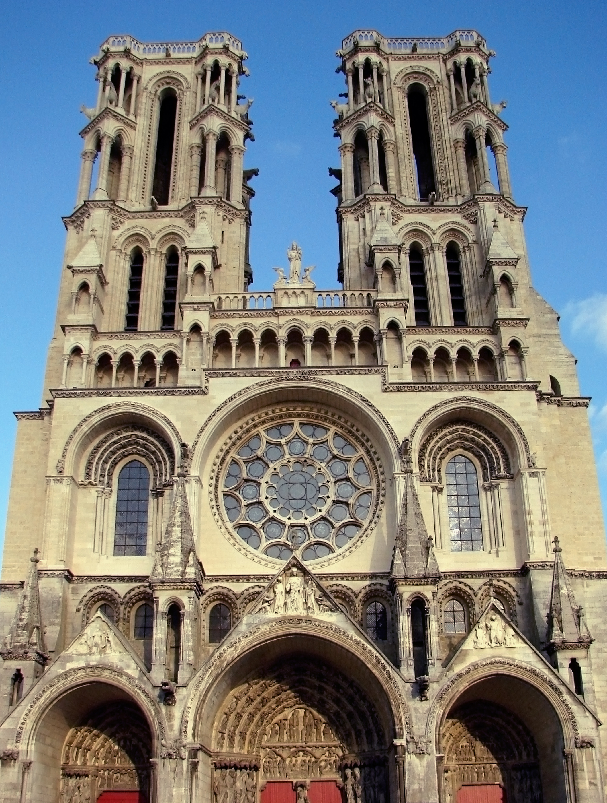 Façade de la cathédrale Notre-Dame de Laon.